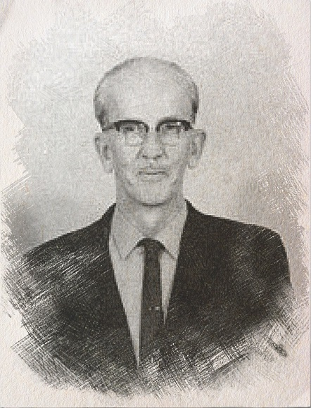 René Pomerleau